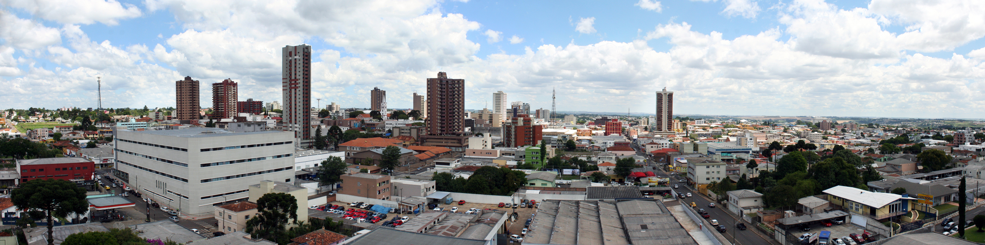 Foto panorâmica do Centro de Guarapuava. A imagem foi criada a partir de várias fotografias tiradas em 17 de novembro de 2011. As fotos foram feitas sentido Sudoeste, a partir do edifício Pinheiro de Gaia ainda em construção.